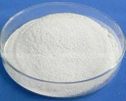 Iodat de potassi en pols cristal·lí